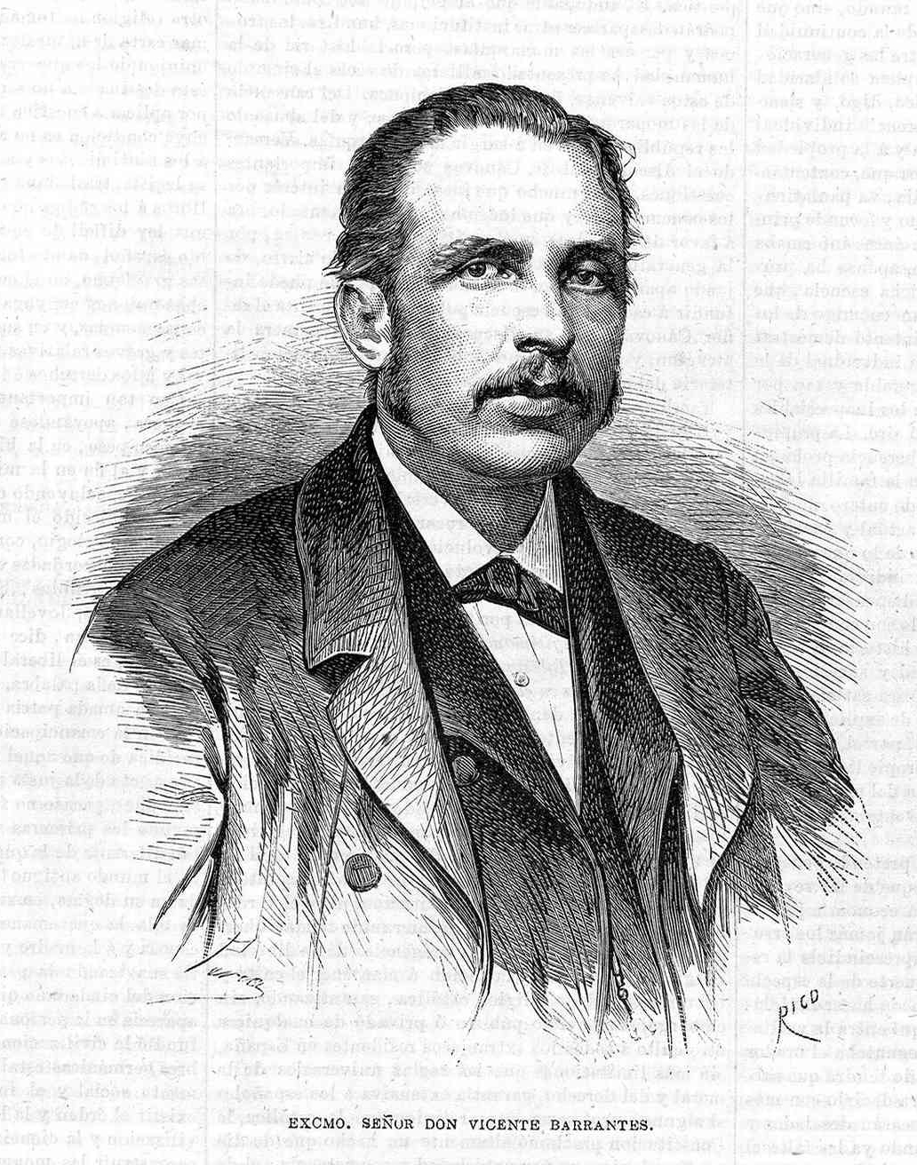 Excmo Sr. Don Vicente Barrantes.